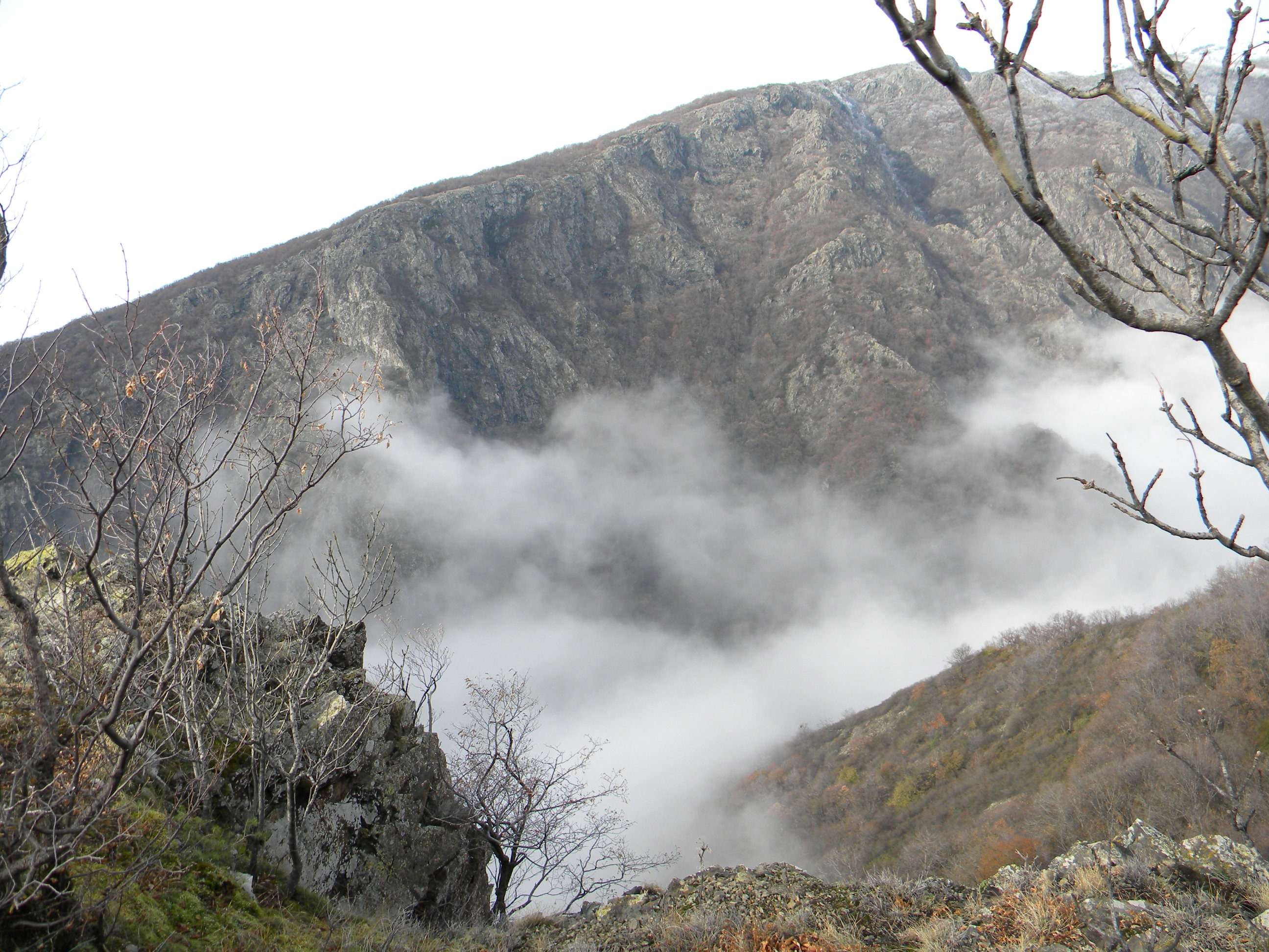 Куру дере